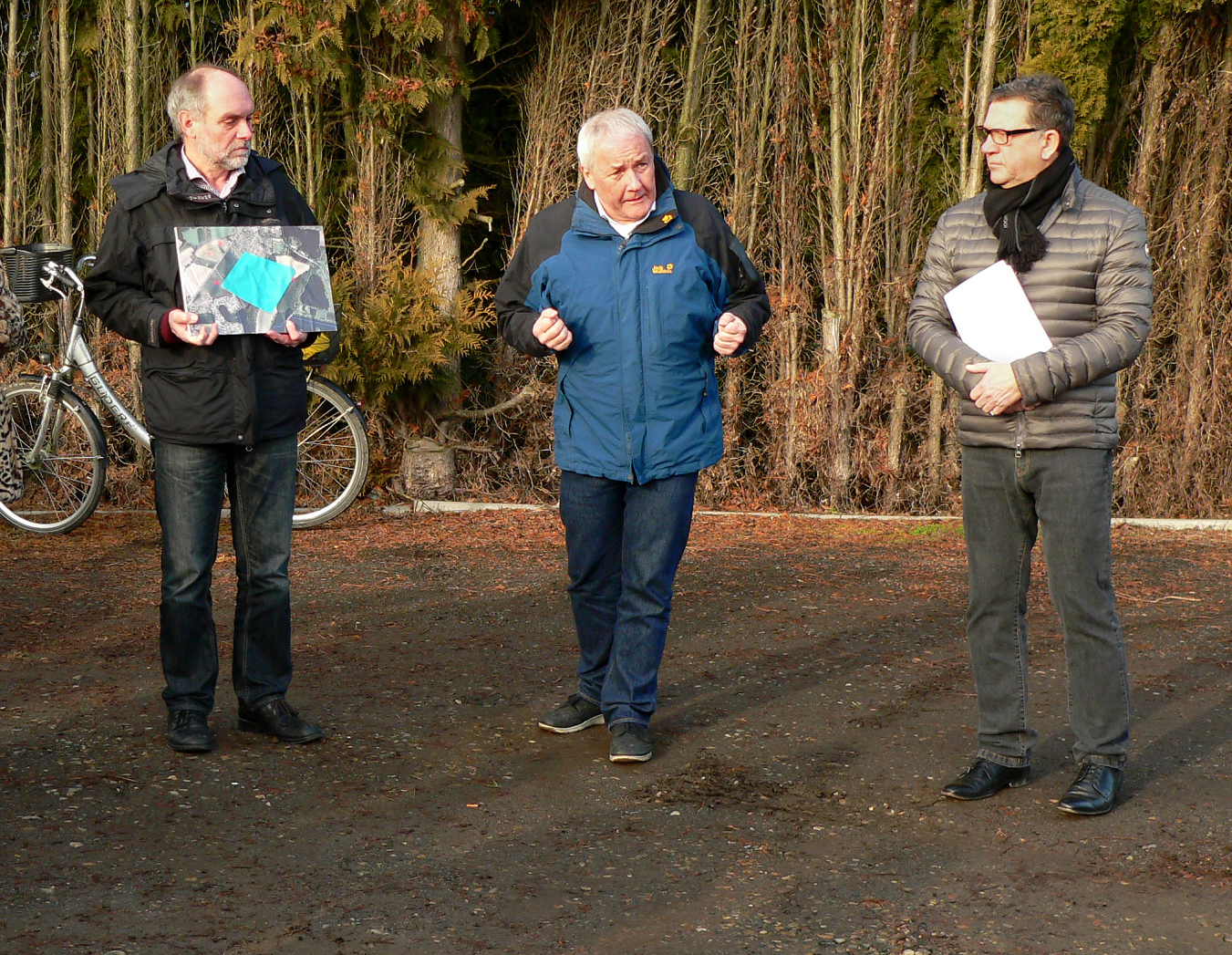 Pressetermin am Römischen Marschlager Wilkenburg mit Bezirksarchäologe Friedrich Wilhelm Wulf, Landesarchäologe Henning Haßmann und Bürgermeister der Stadt Hemmingen Claus-Dieter Schacht Gaida.